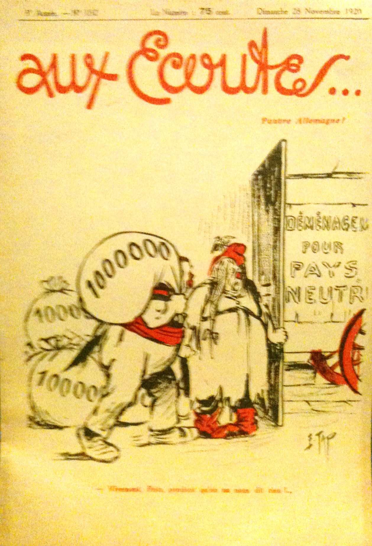 Aux écoutes, magazine satirique français fondé par Paul Lévy. Couverture du numéro 132 du 28 novembre 1920 titrée « Pauvre Allemagne ! » avec un dessin d'Émile Tap (1876-1940) légendé : « Vivement, Fritz, pendant qu'on ne nous dit rien !... ».